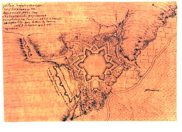 Plan de la forteresse de Charleroy, en Hainault, pris sur les Espagnols qui l'avoit construy en l'année 1666 et démoly et rebasty par le Roy en l'année 1667, en l'estat qu'il est à présent